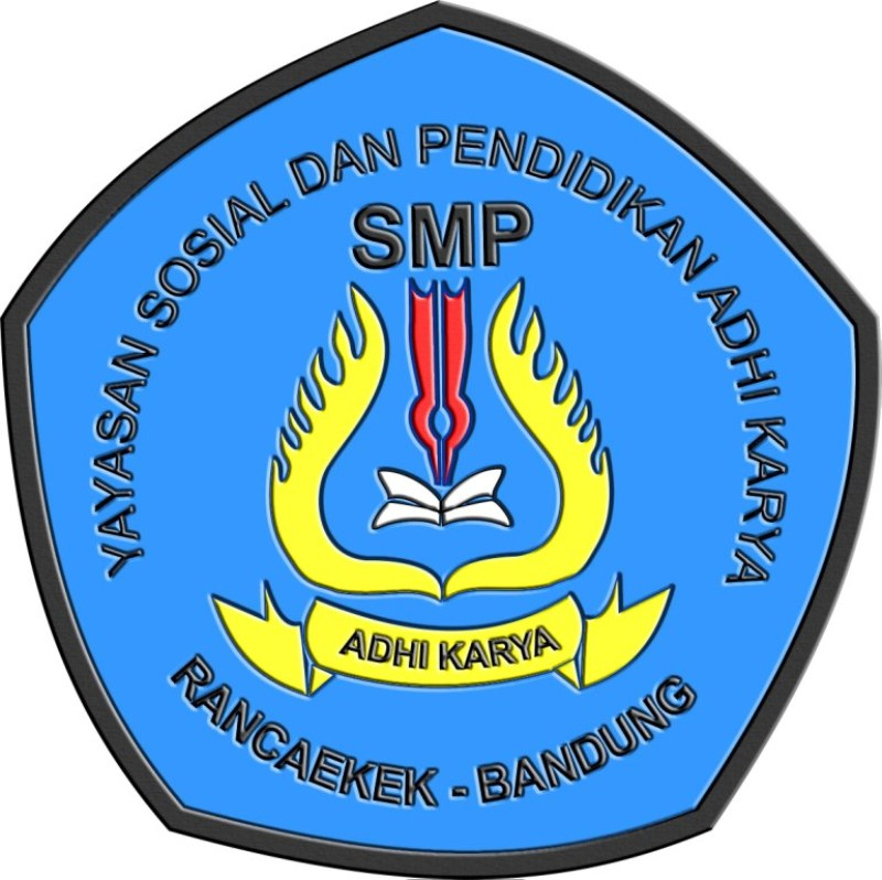 smp adhi karya rancaekek